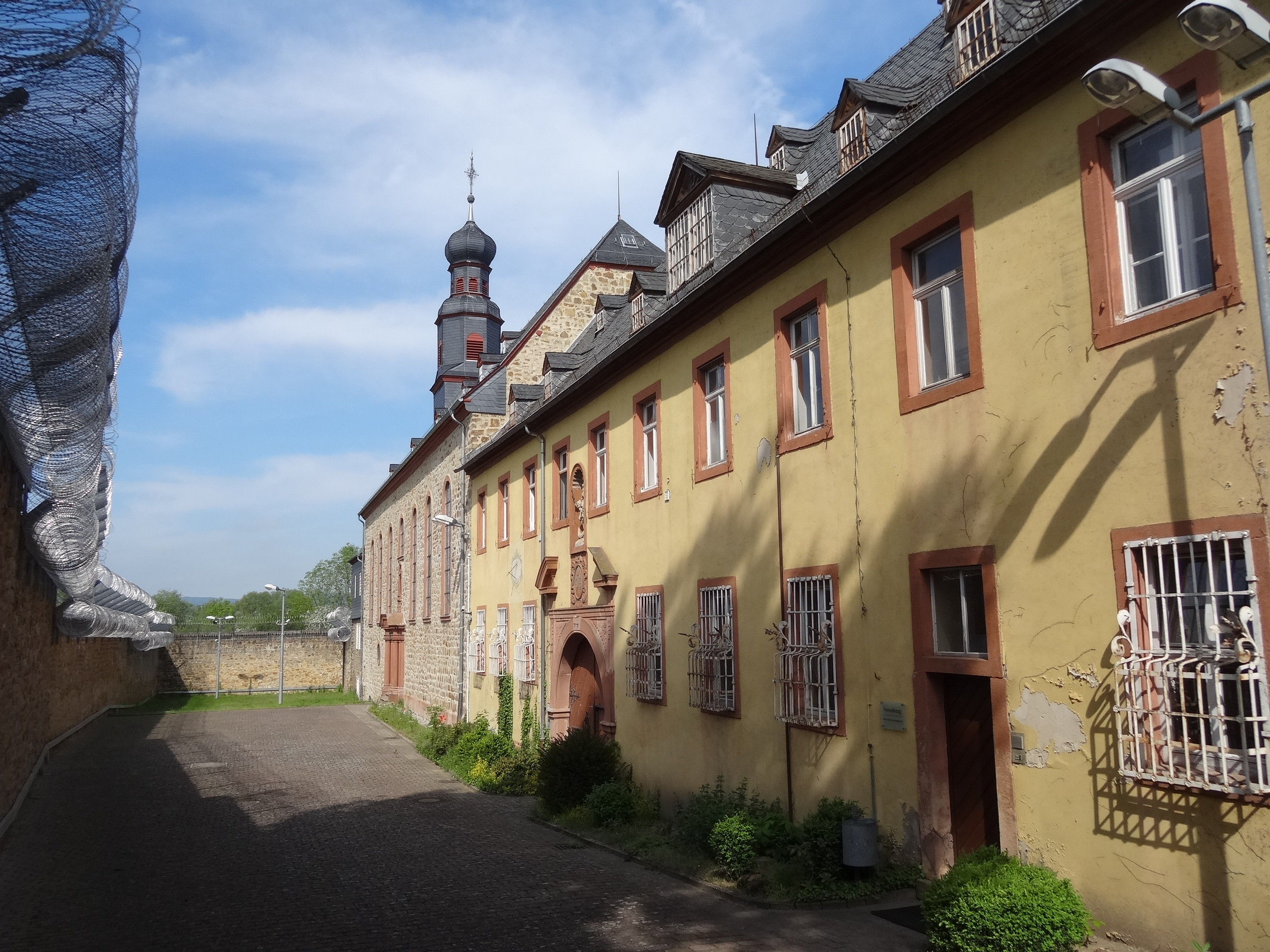 Östlicher Gebäudeflügel (JVA Rockenberg)